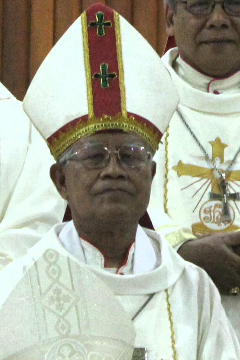 Mgr Anicetus Bongsu Antonius Sinaga, Uskup Agung Medan